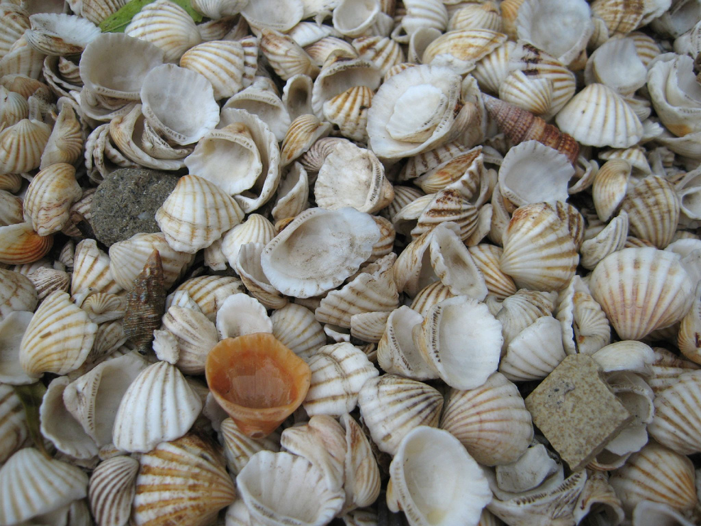 Coquillages à Fadiouth, Sénégal; bien connu sec, le 'pan' dans la cuisine Senegalese.